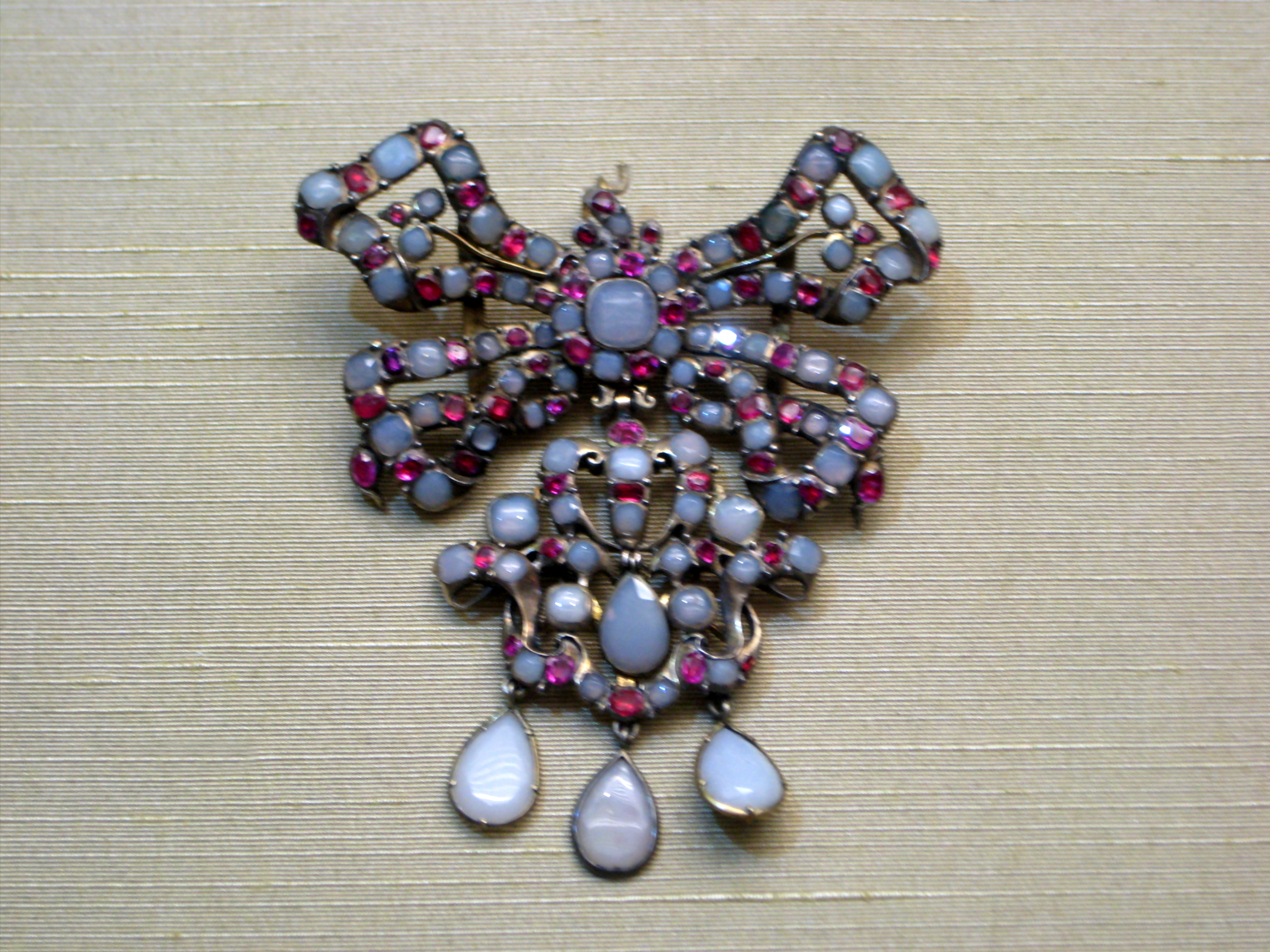 Брошь. 18 век (?)